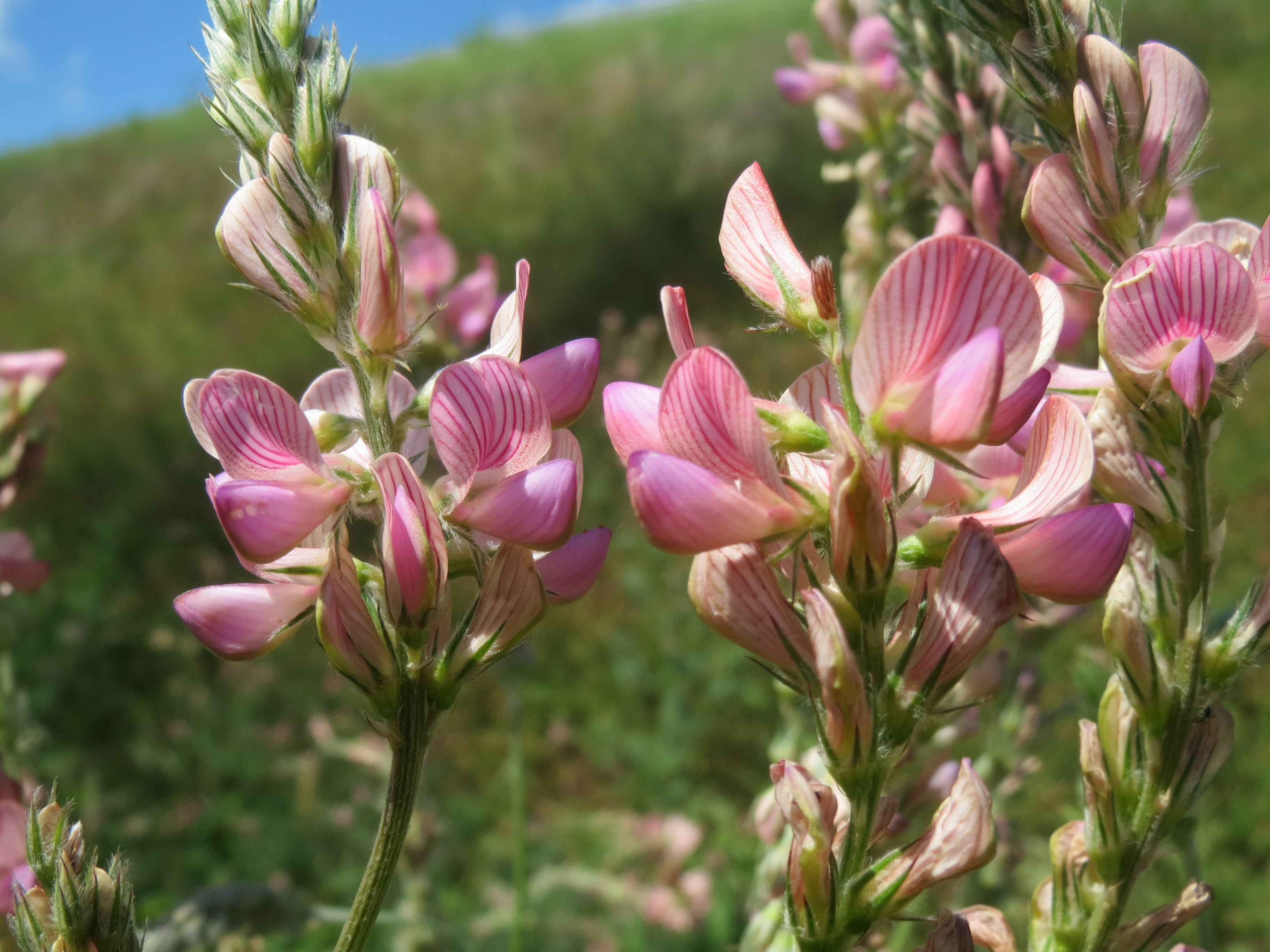 Saat-Esparsette (Onobrychis viciifolia) bei Schwetzingen